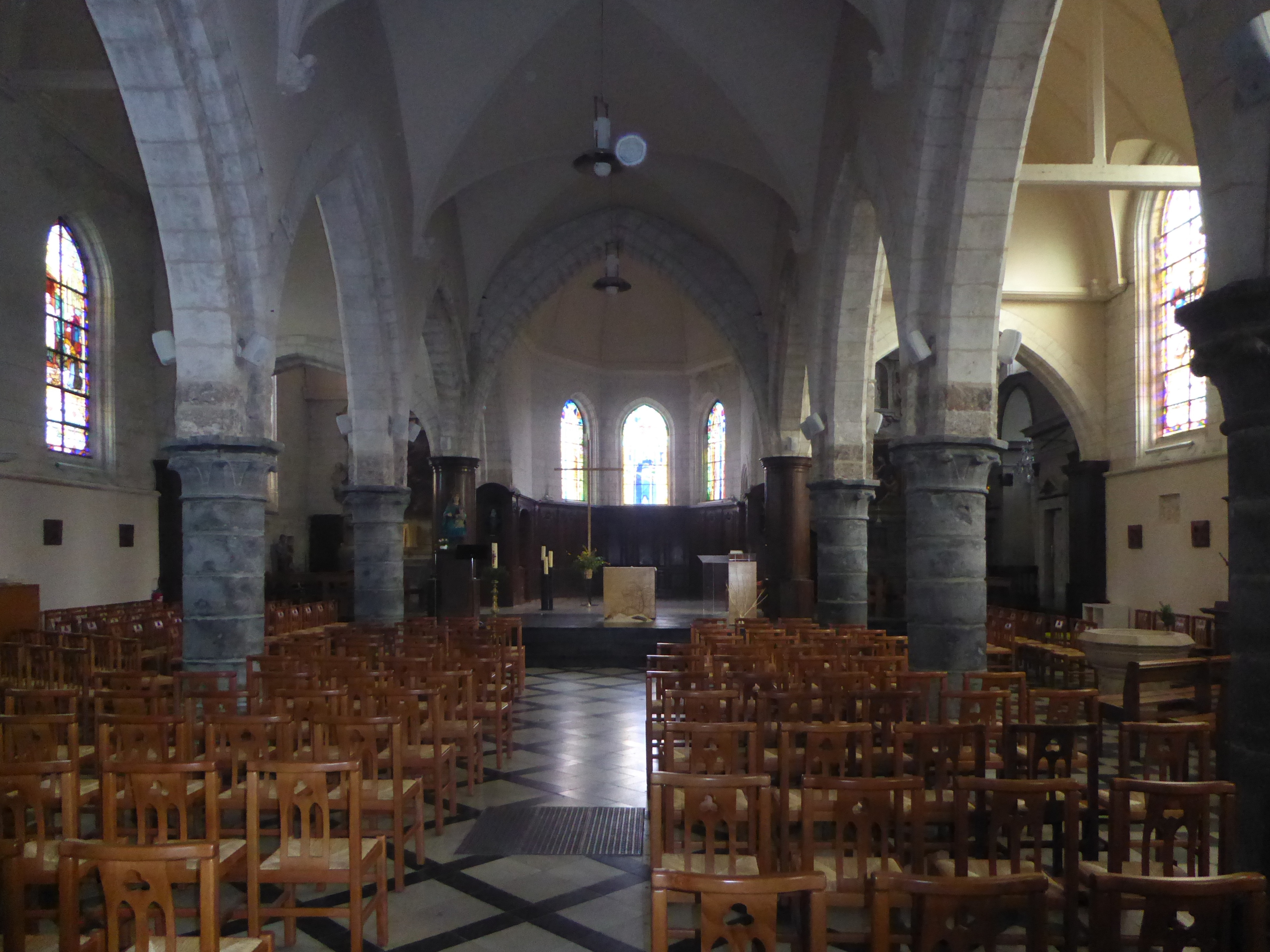 Eglise Saint-Sébastien d'Annappes (intérieur) Villeneuve-d'Ascq,France